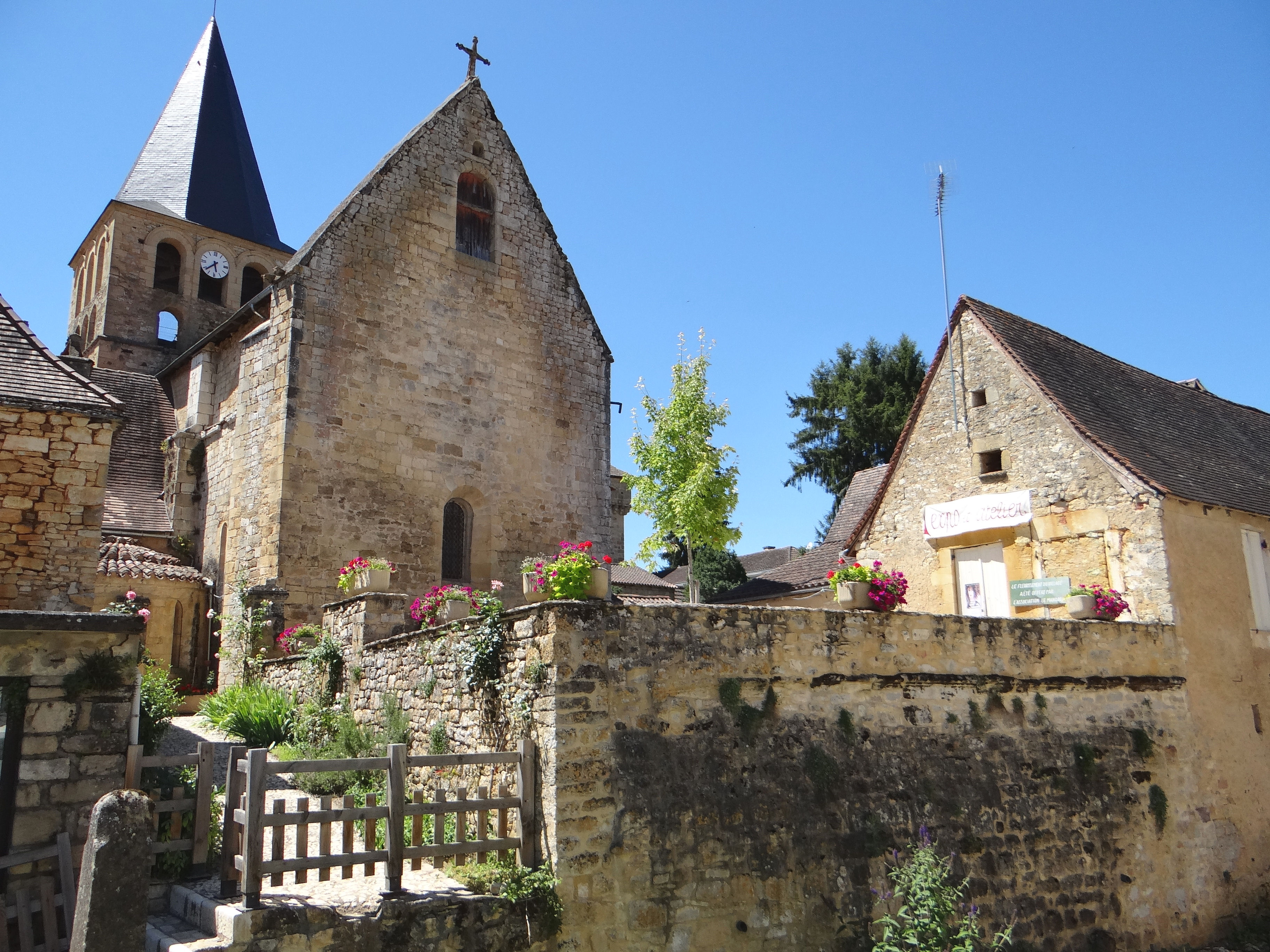 Saint-Pompont - Église Saint-Jean-Baptiste - Vue d'ensemble